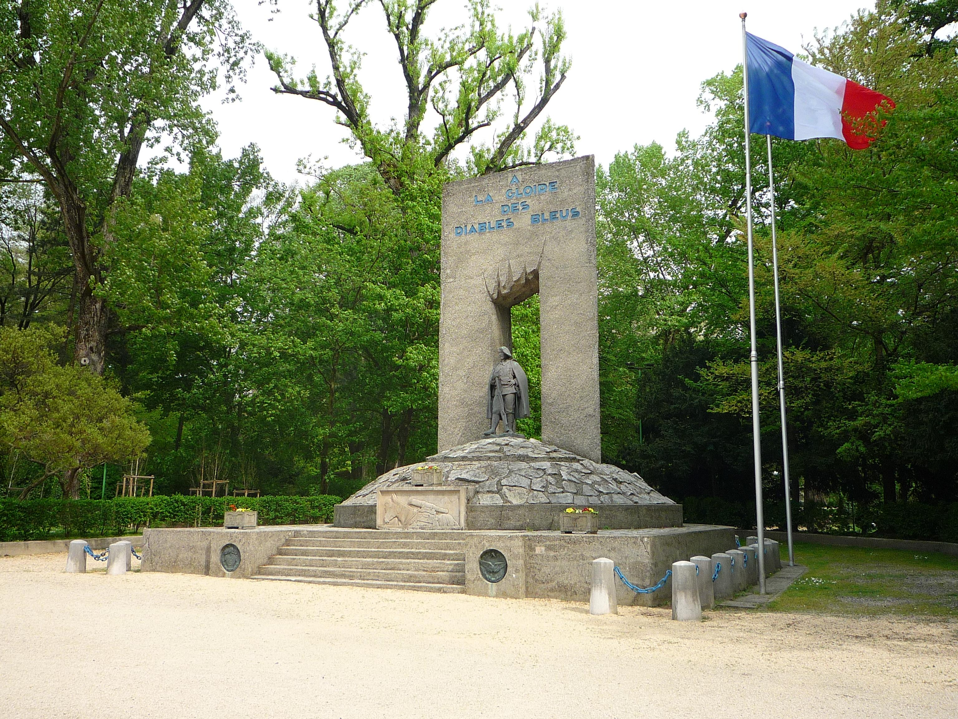 Monuments de 1936 dédié aux diables bleus (chasseurs alpins)